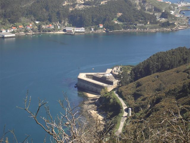 Castelo da Palma Ría de Ferrol, Galicia, Spain.